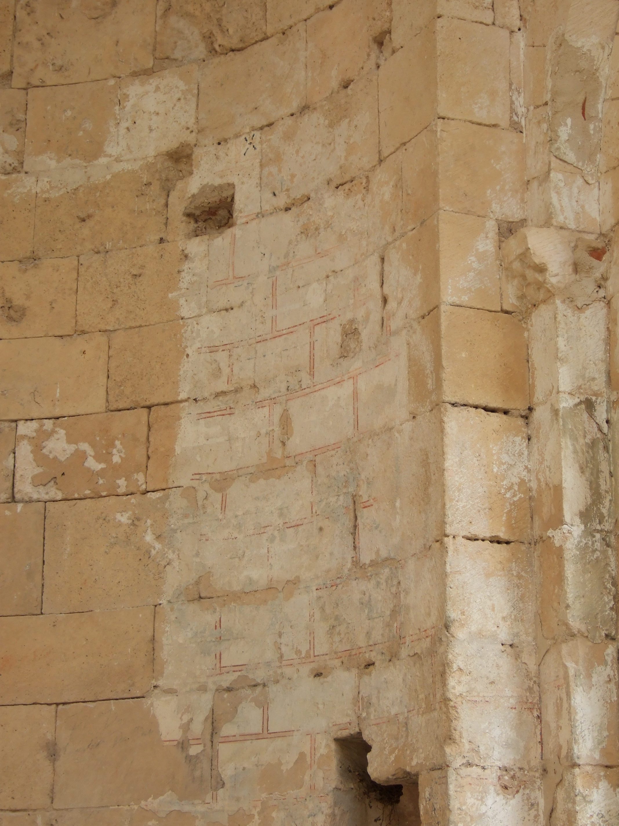 Monasterio de San Pedro de Arlanza s. XI-XII - Restos de pintura del ábside